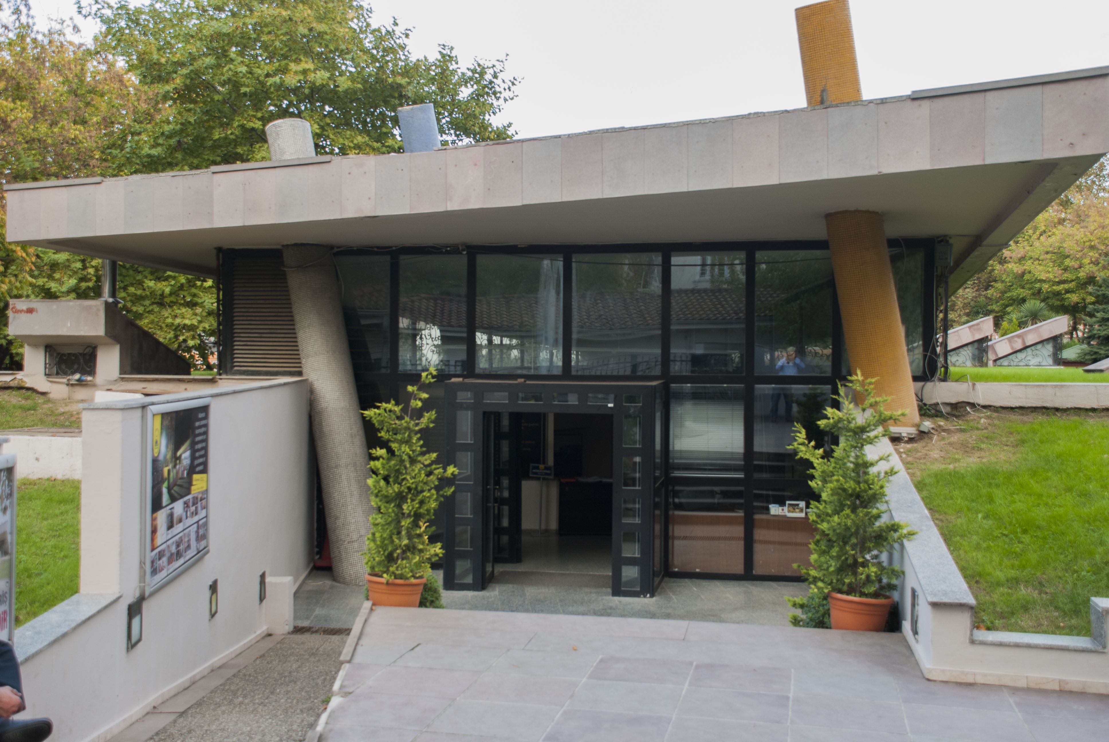 Deprem Müzesi, Sakarya